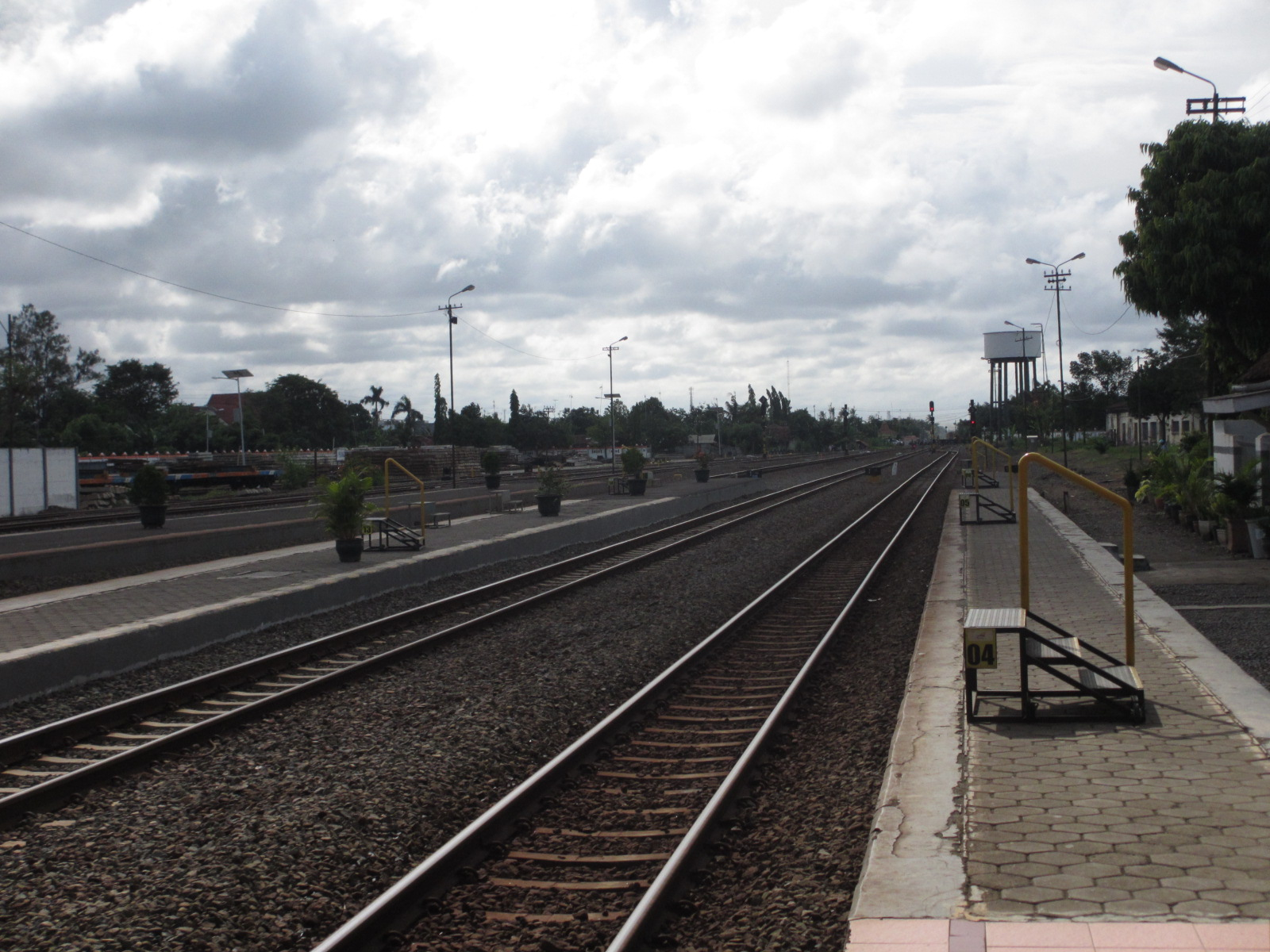 Emplasemen Stasiun Pekalongan ke arah barat.